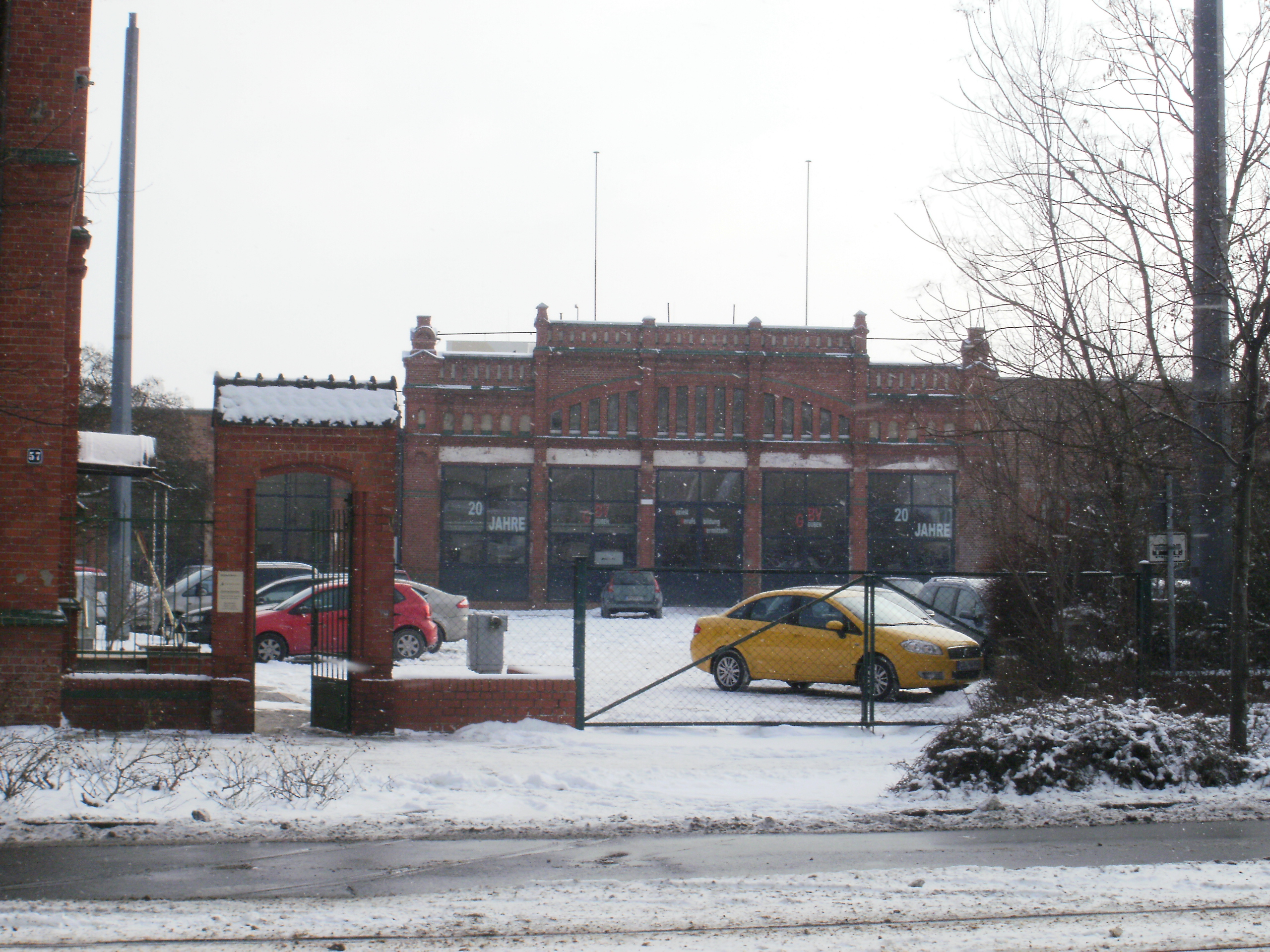 Werkstätten der Städtischen Straßenbahn, Berliner Straße 58, Cottbus